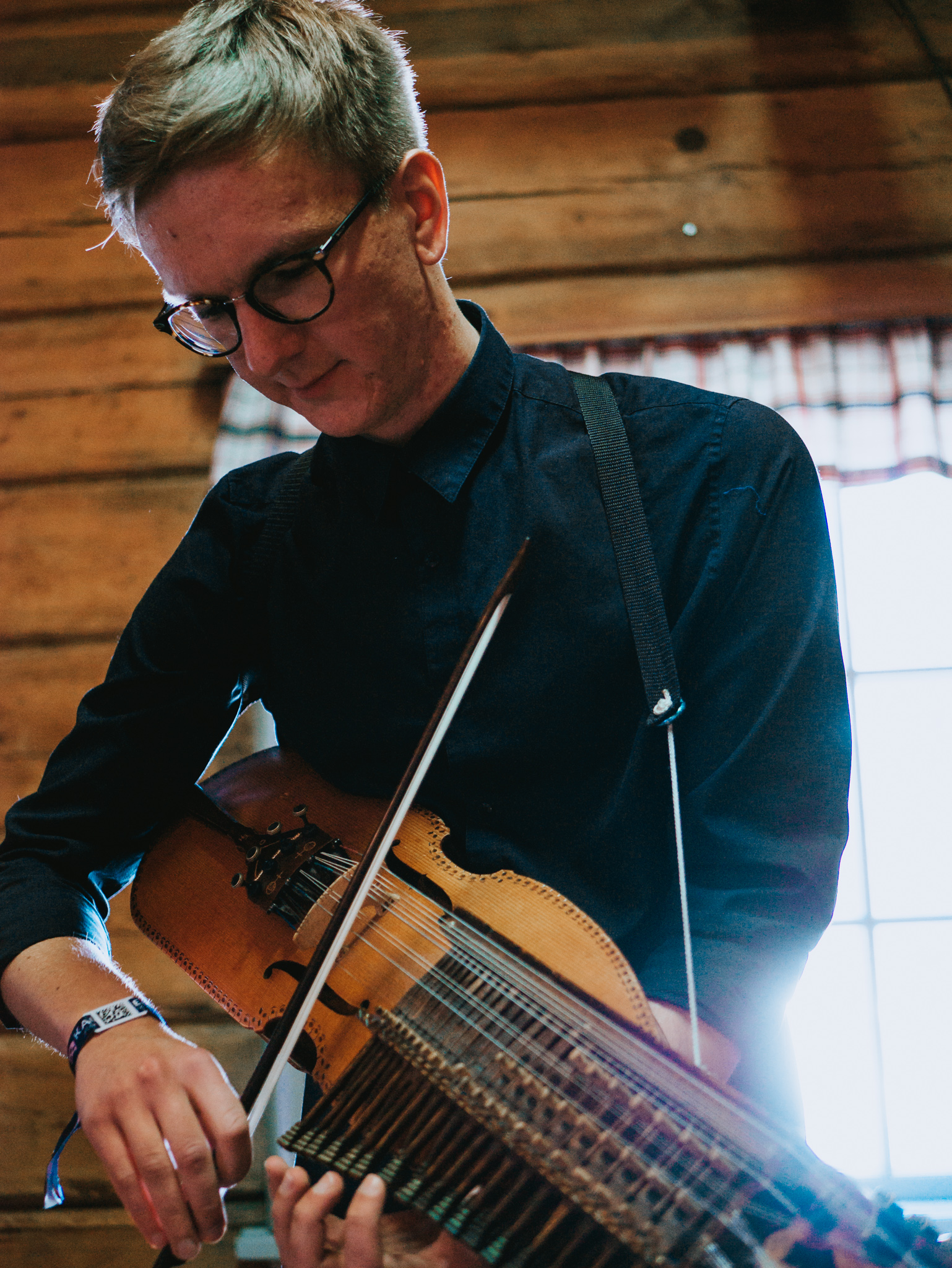 At Kaustinen Folk Music Festival.